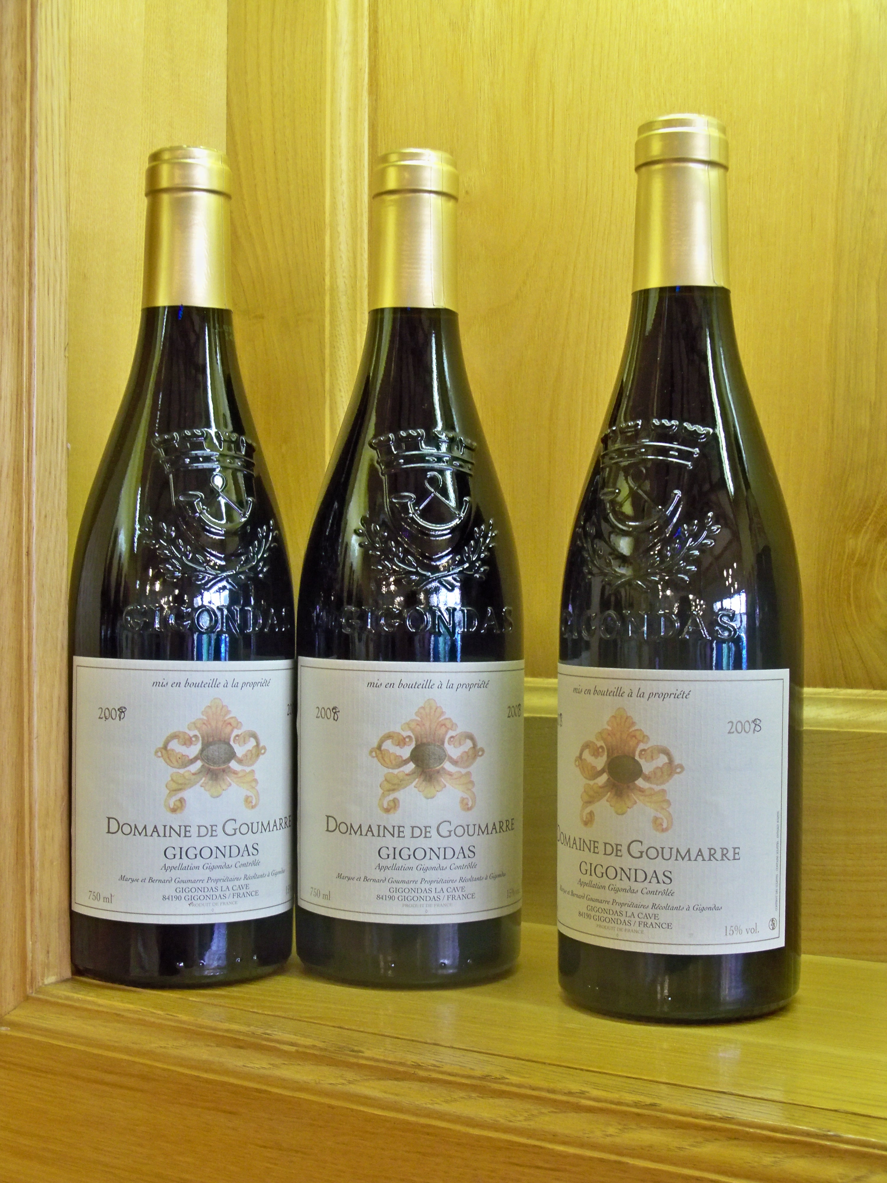 Bouteille de Gigondas (Vaucluse) - Domaine de Goumarre